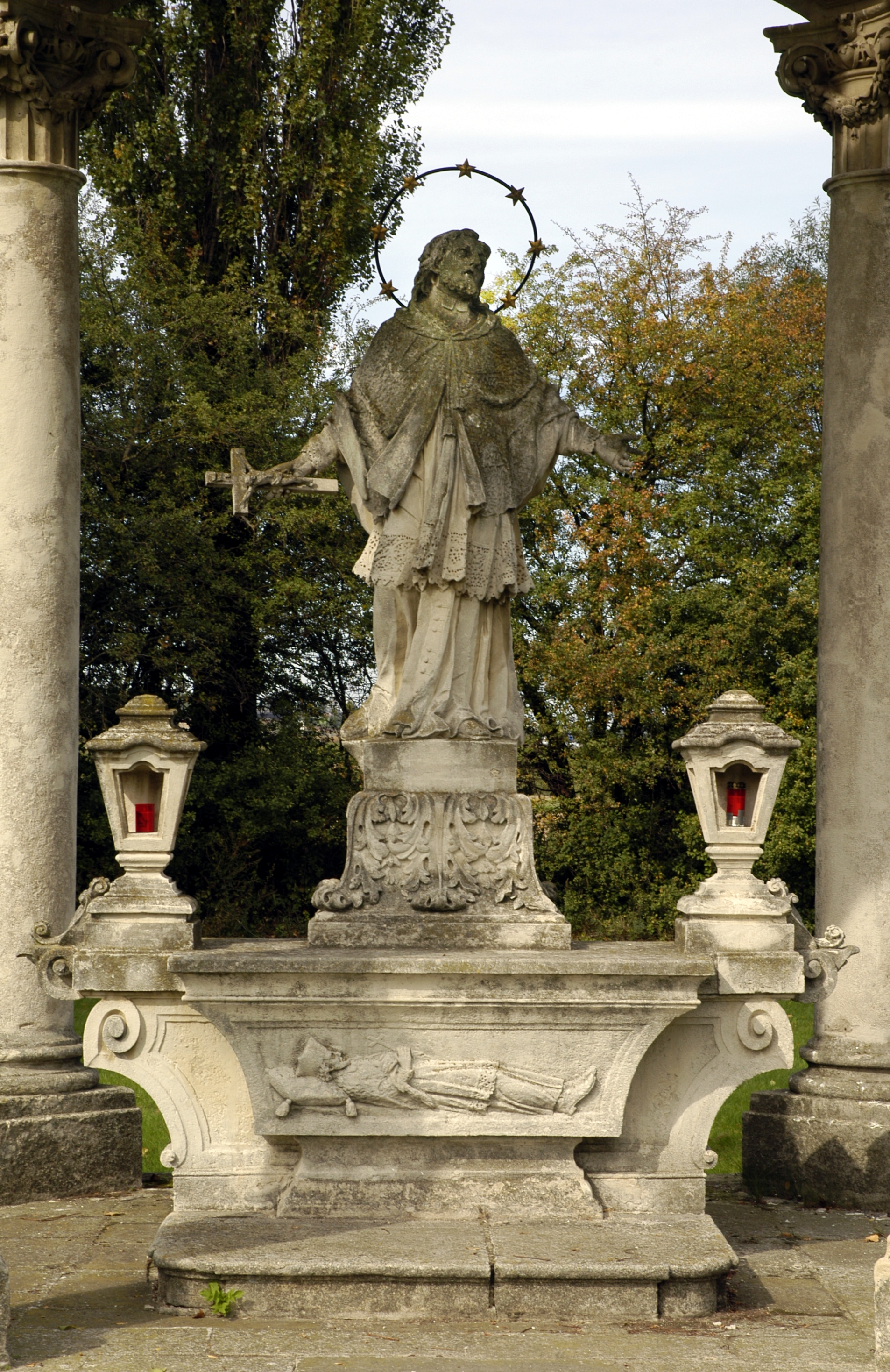 Hl. Johannes Nepomuk-Kapelle/Detail